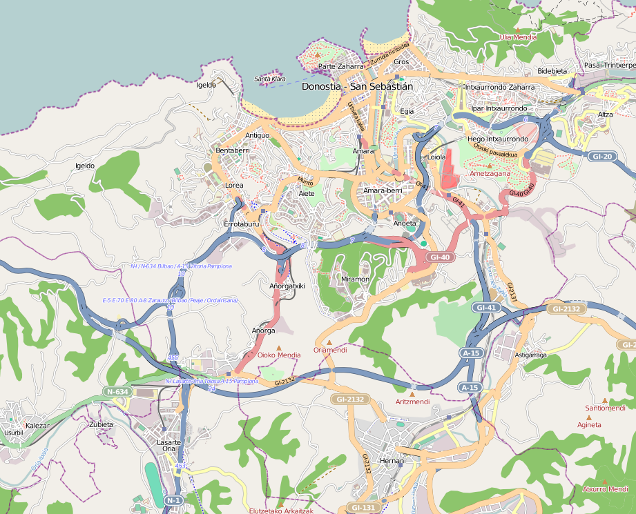 Donostiako auzoen kokapen mapa. Gipuzkoa, Euskal Herria. Location map of Saint Sebastien's neighbords. Gipuzkoa, Basque Country.